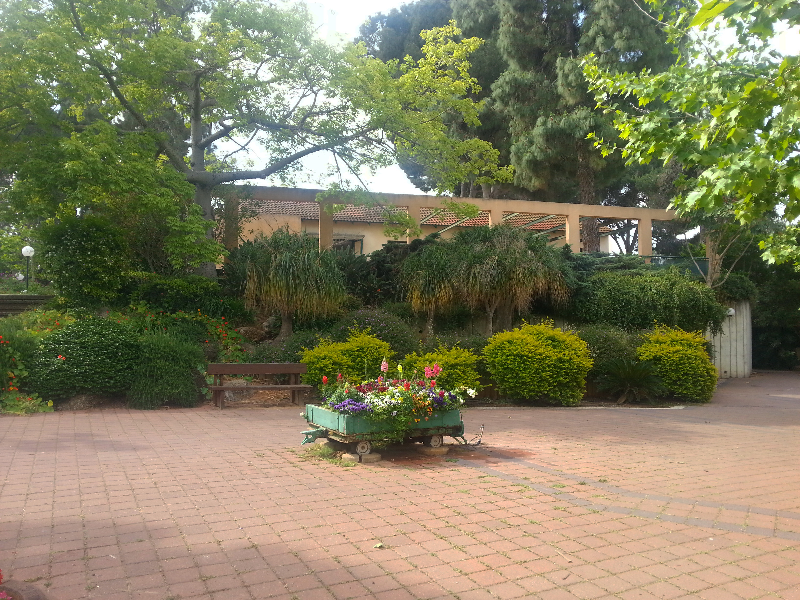 מבט מלמטה